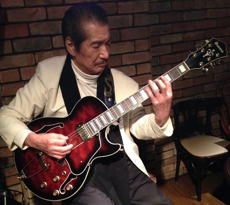 ギタリスト和田直